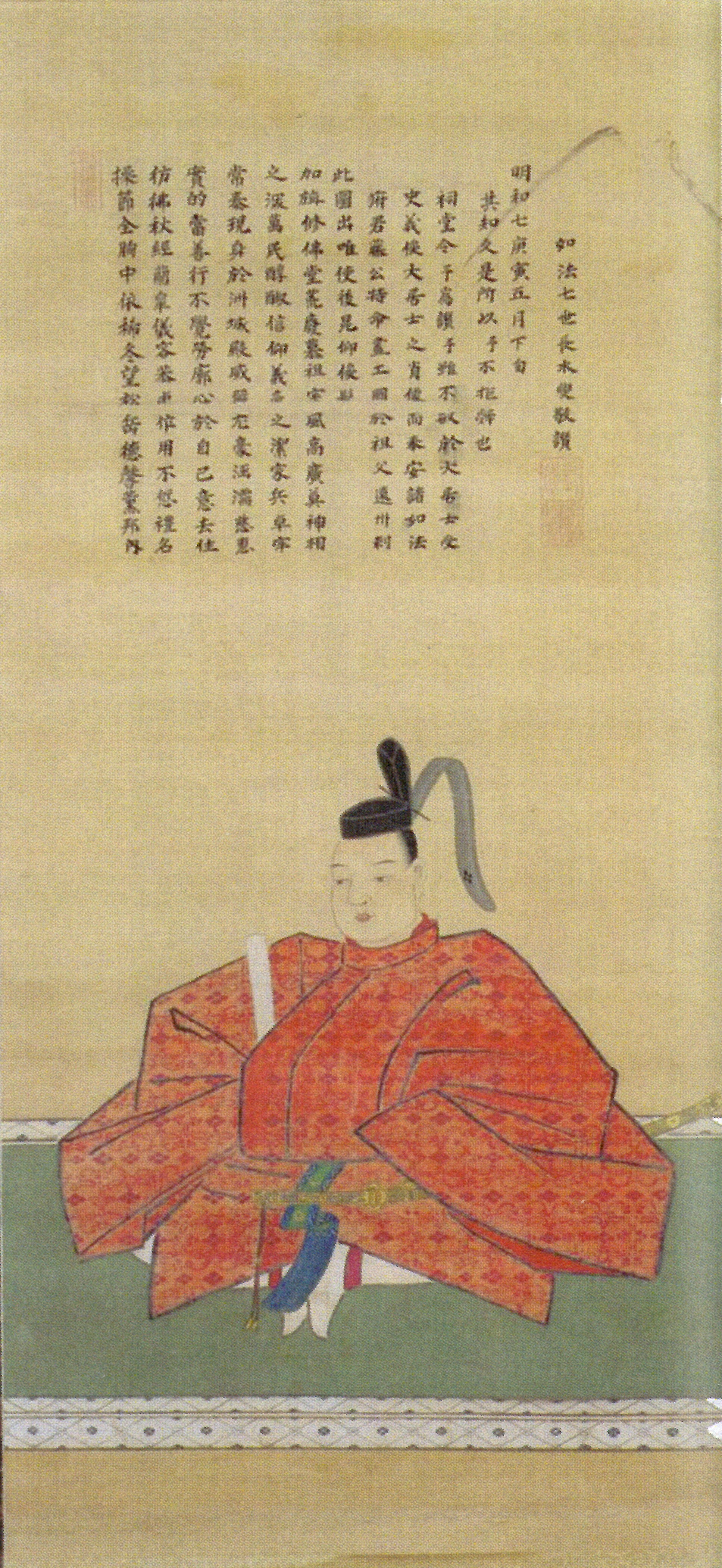 加藤泰武の肖像。